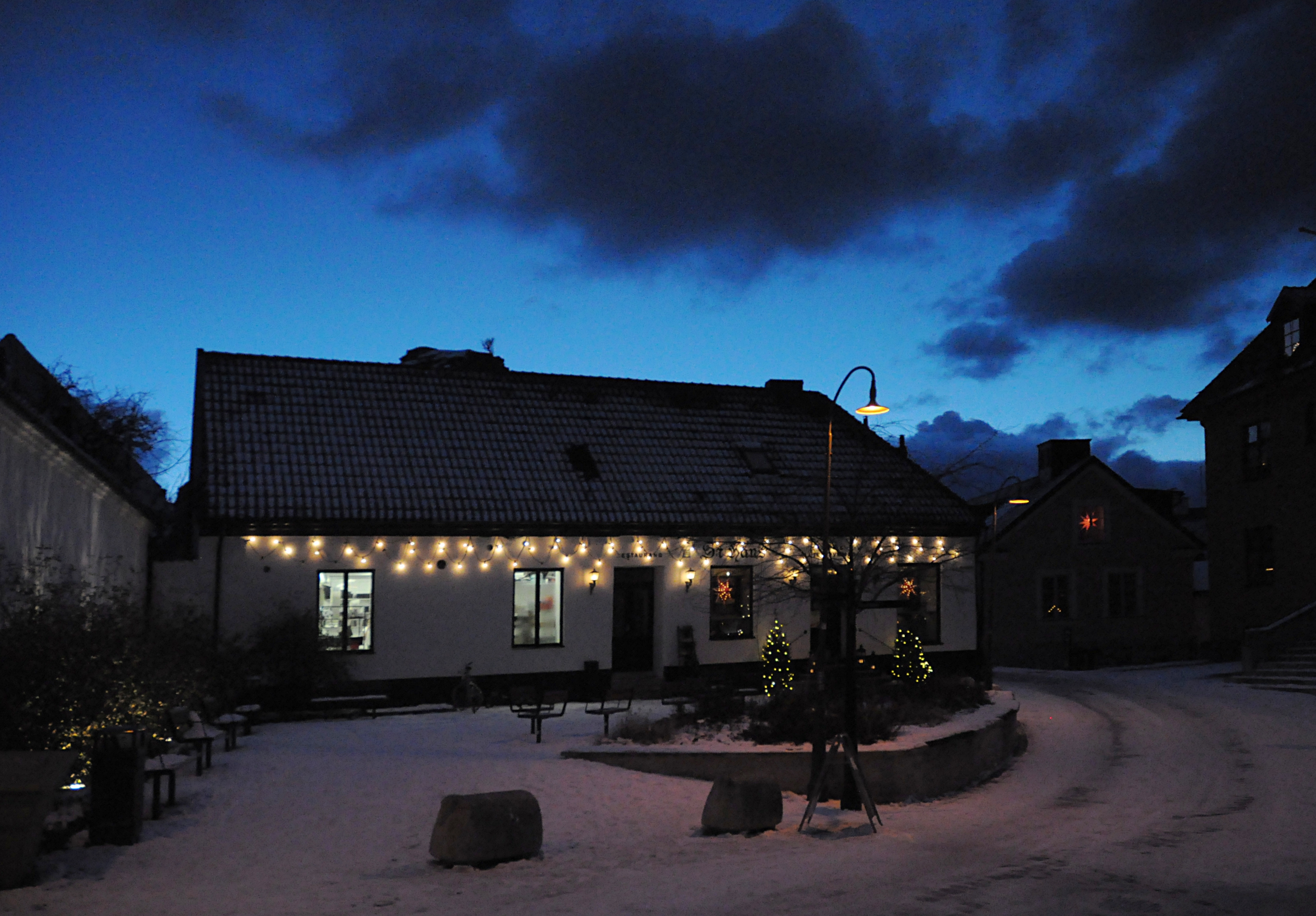 S:t Hans Café och Restaurang på Sankt Hans plan 2 i Visby.